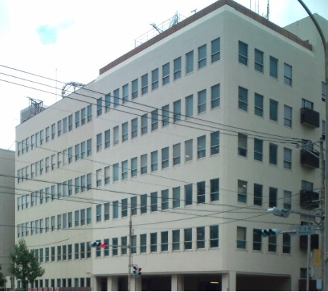 長崎県警察本部